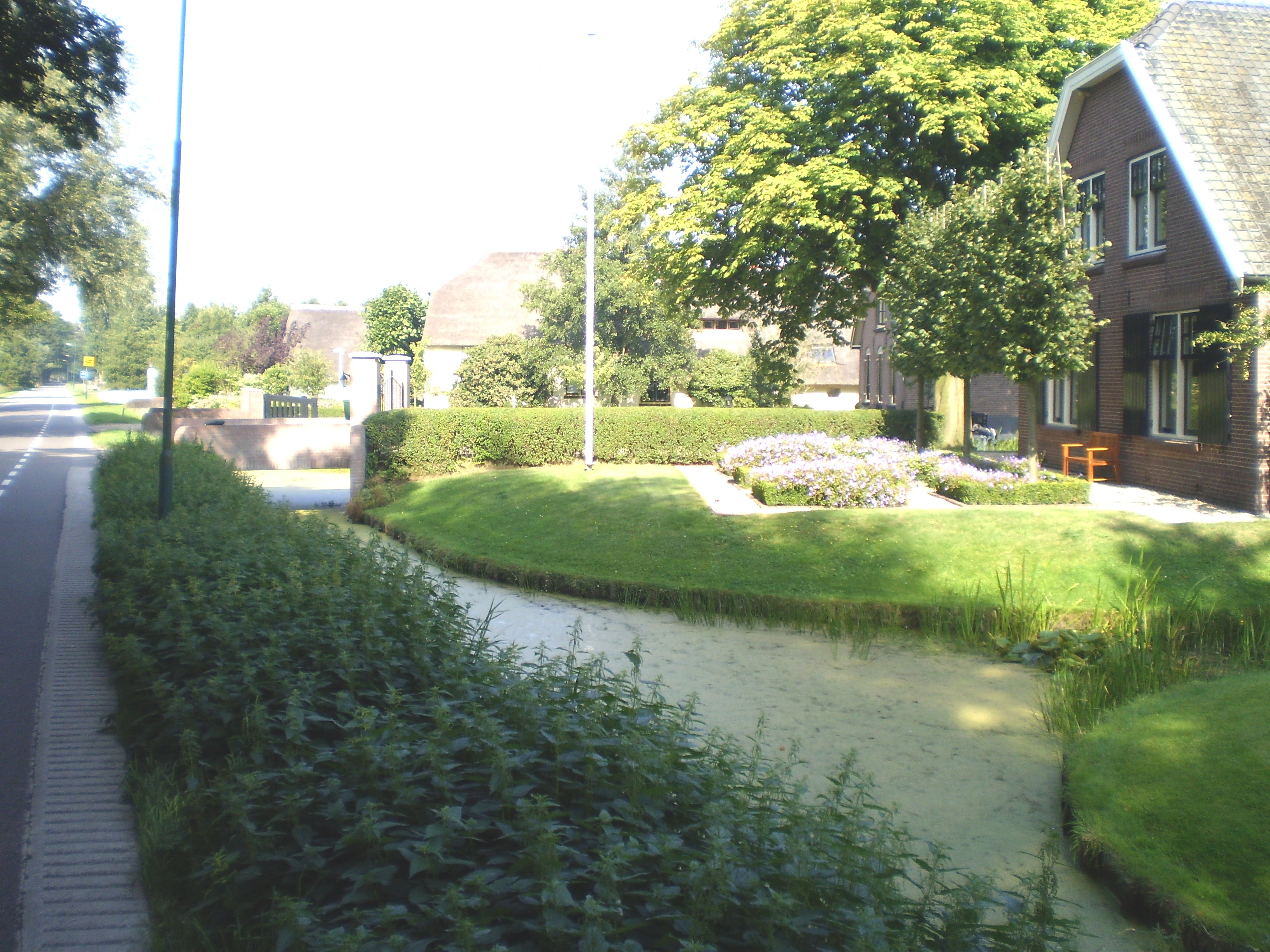 Foto oanbean troch Kees Swart op 20 augustus 2009